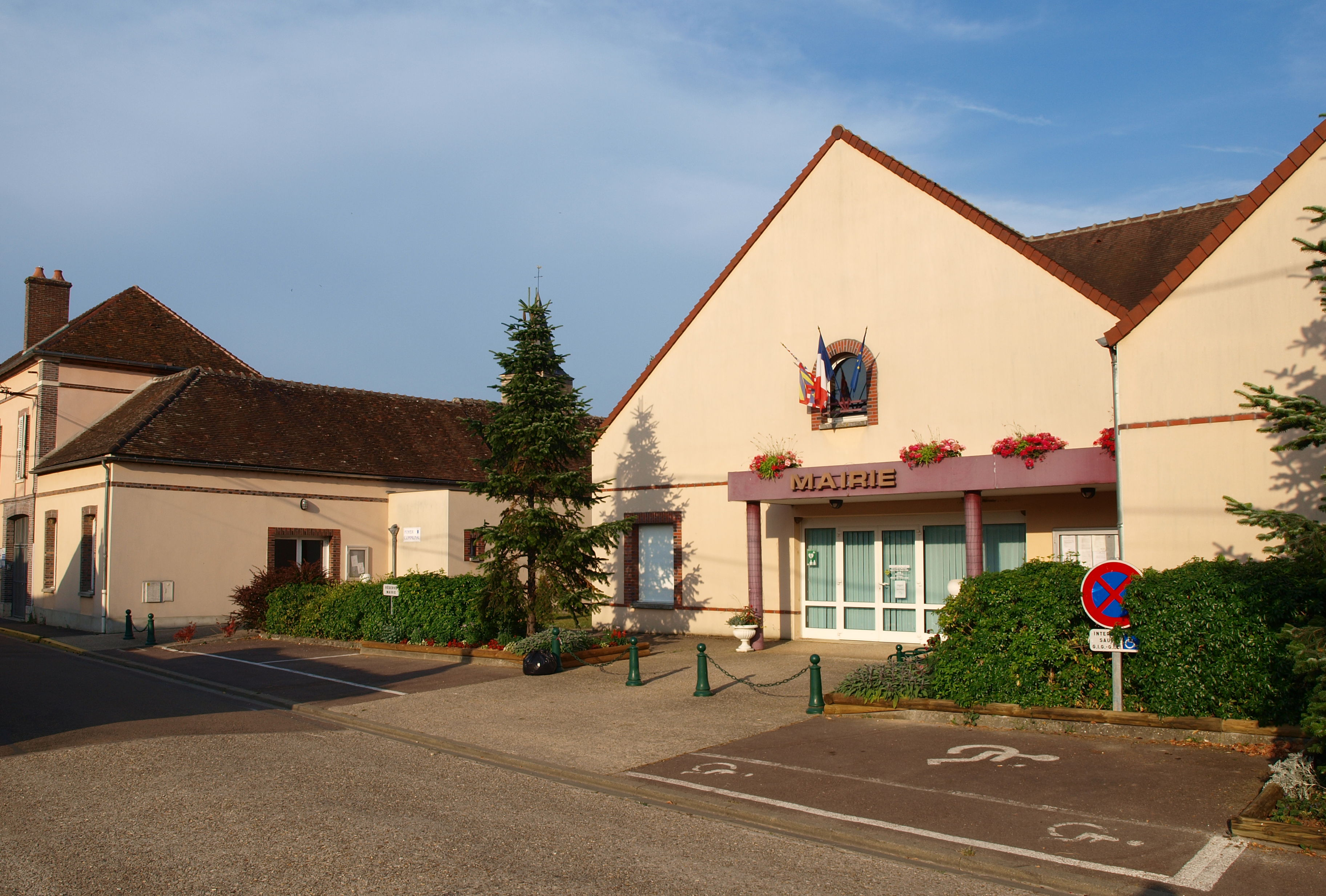 Véron (Yonne, France) ; mairie